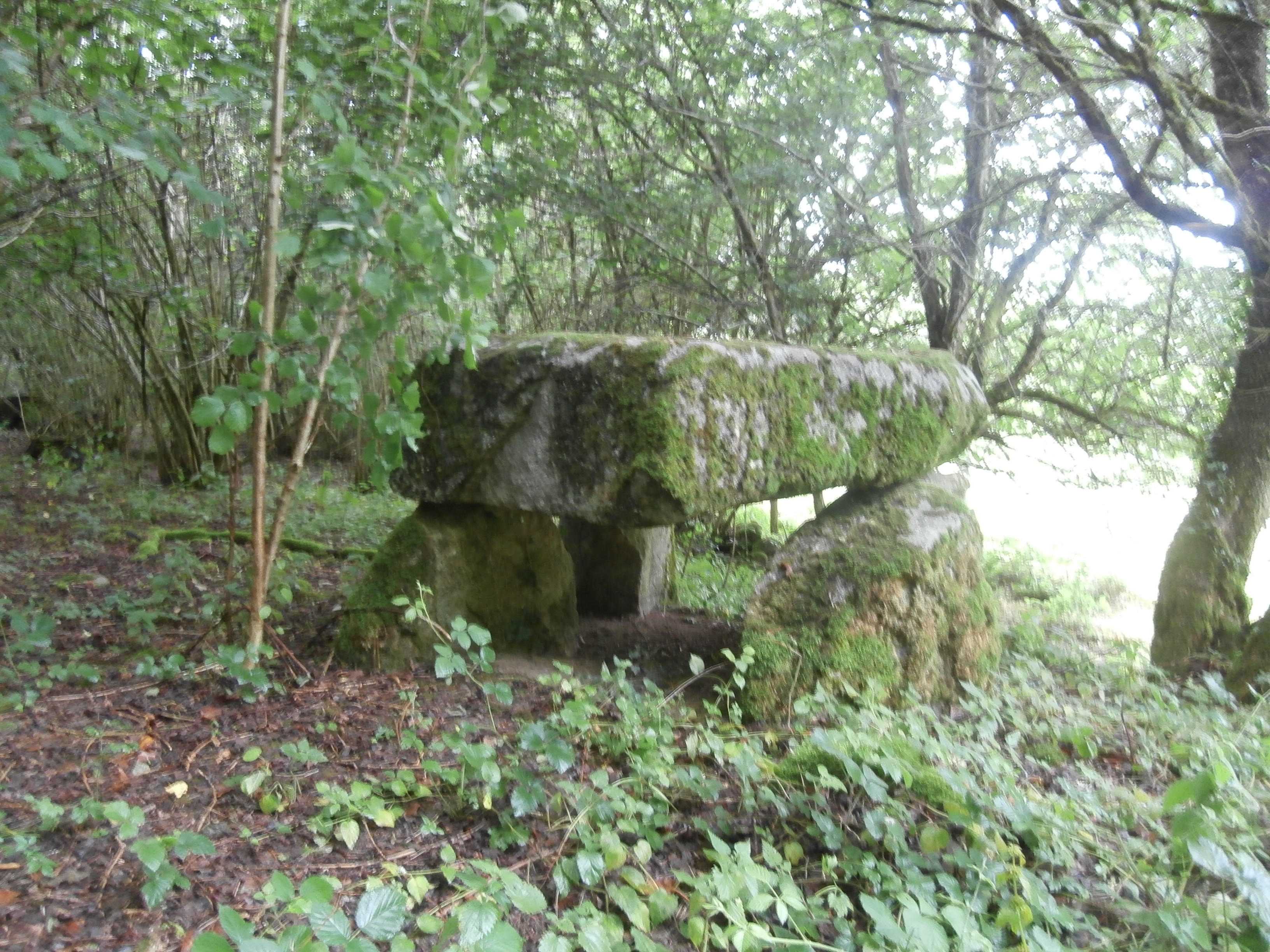 Dolmen du Chezeau (France - Saint-Yrieix-les-Bois)